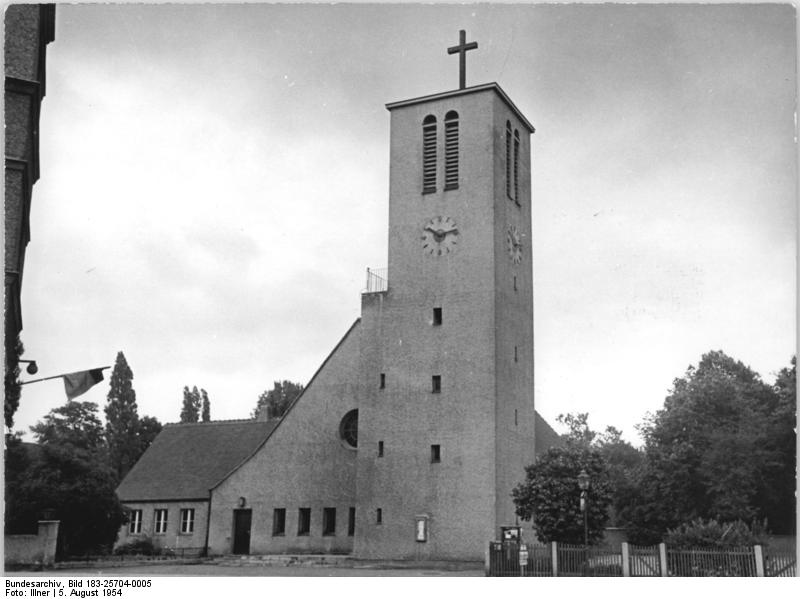 Leipzig, Trinitatiskirche Zentralbild Illner Wjk-Qu 5.8.1954 Leipziger Motive und Stadtbilder UBz: Leipzig: Trinitatiskirche. Bereits im Jahre 1950 in Leipzig wiedererbaut. Der ehemalige Kirchenbau, in Holz ausgeführt, wurde durch einen Luftangriff im Hitlerkrieg zerstört.